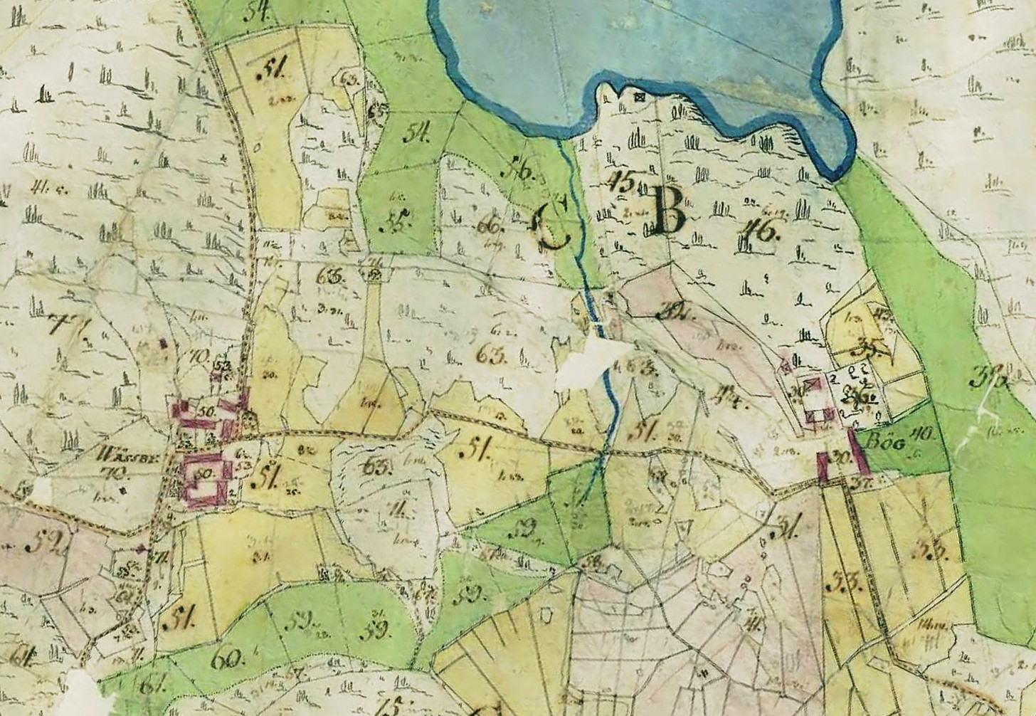 Del av karta över Edsbergs ägor visande gårdarna Väsby och Bög